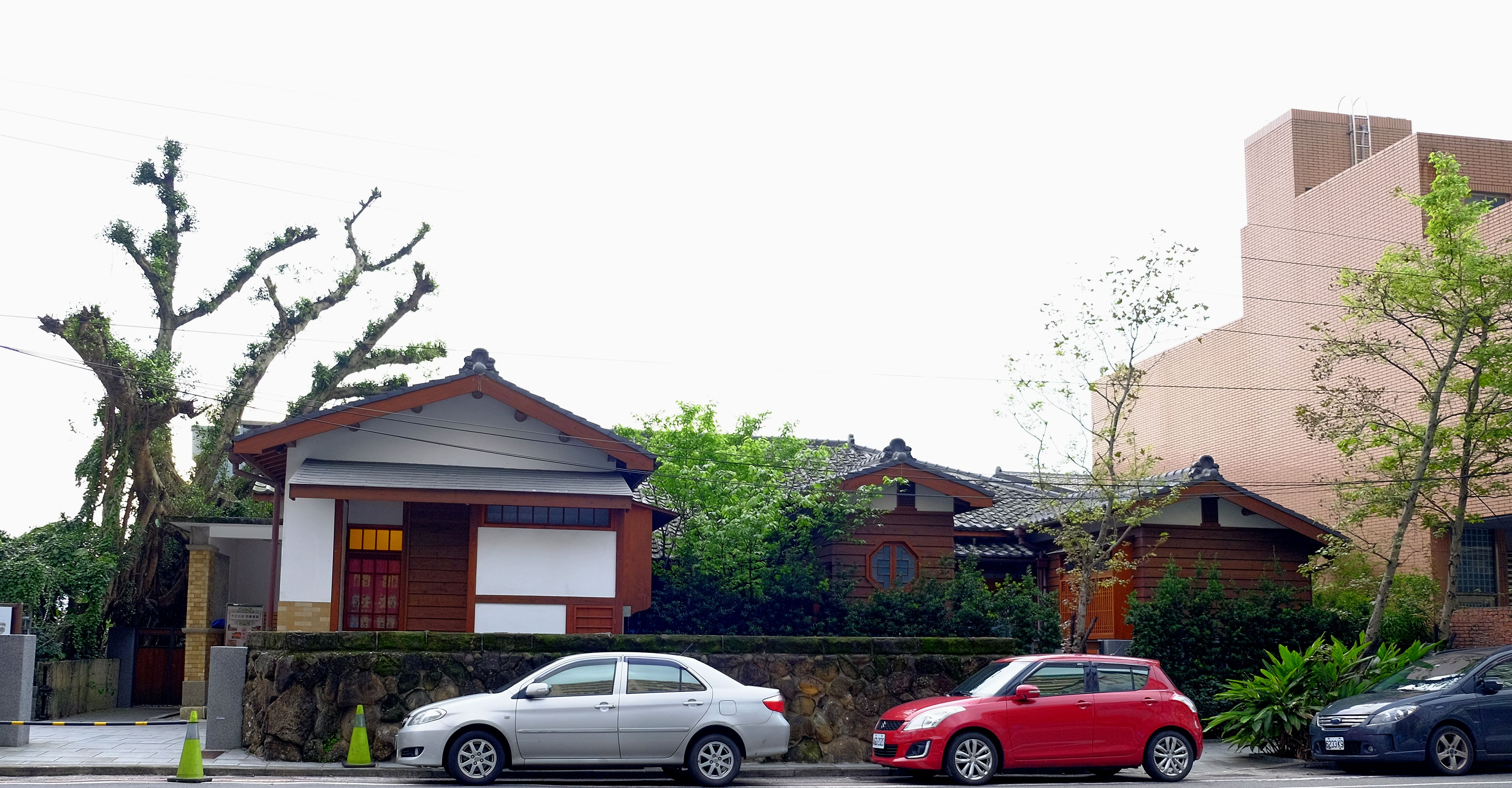 基隆市歷史建築市長官邸